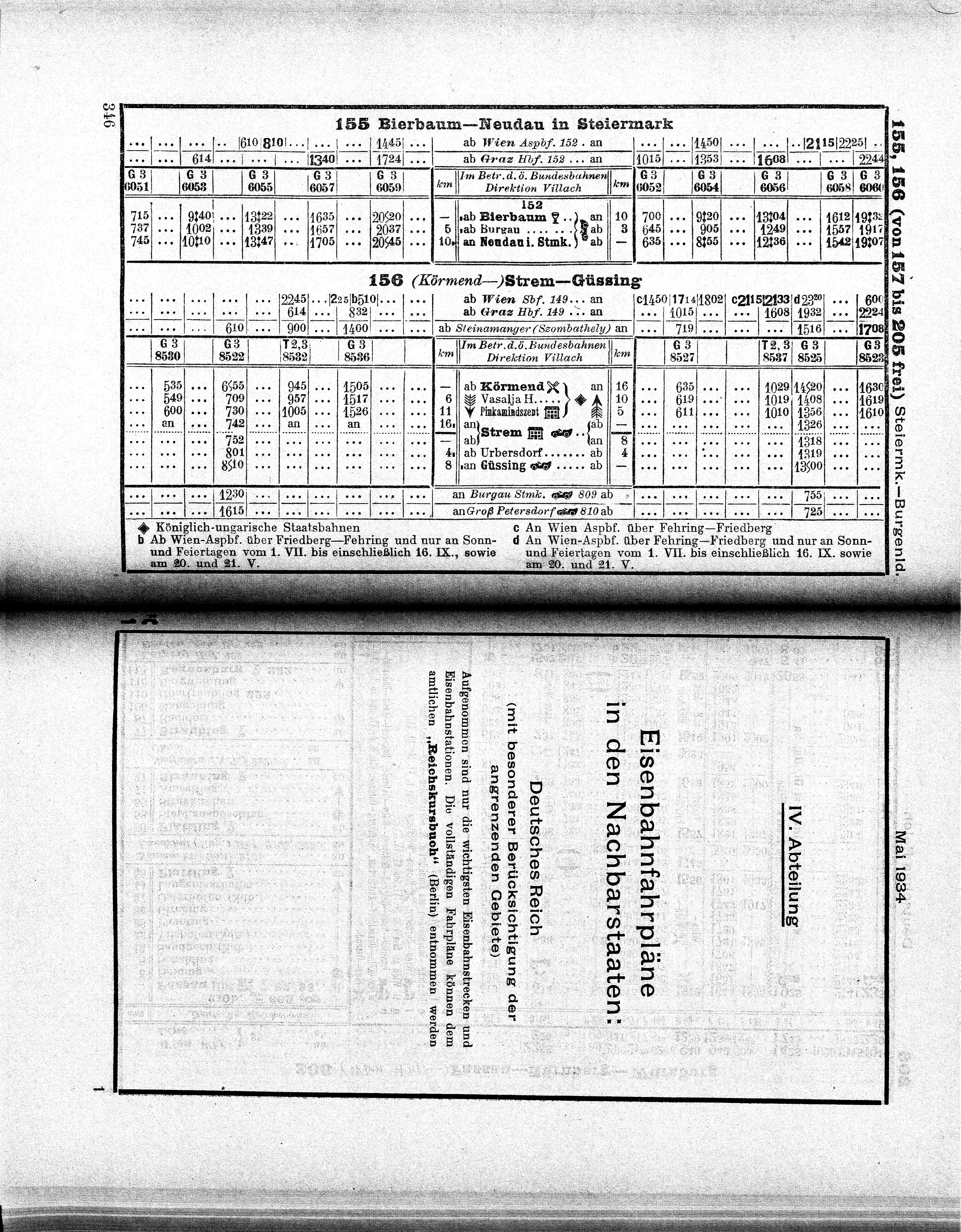 Bahnverbindungen der Strecken Bierbaum-Neudau in Steiermark und Körmend-Vasalja-Pinkamindszent-Strem-Urbersdorf-Güssing.